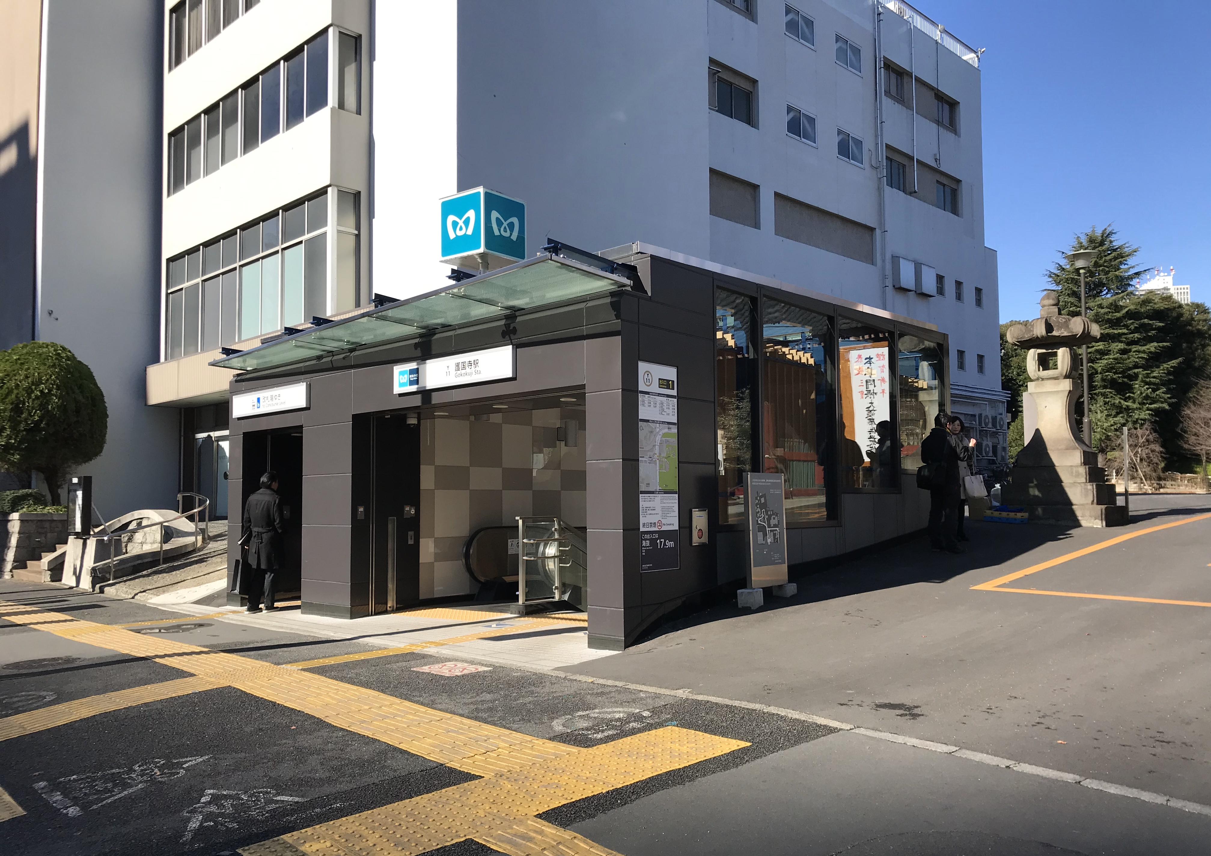 東京メトロ有楽町線護国寺駅1番出入口